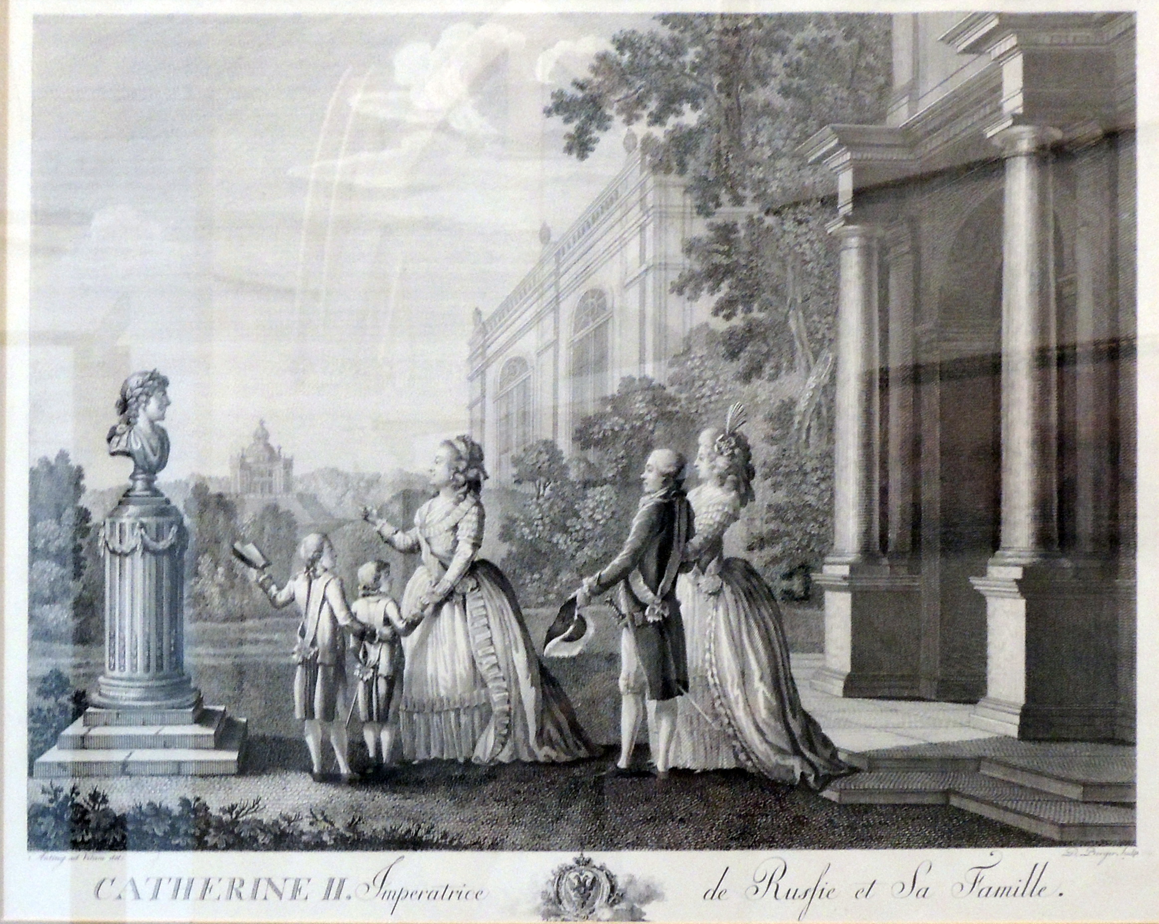 Гравюра